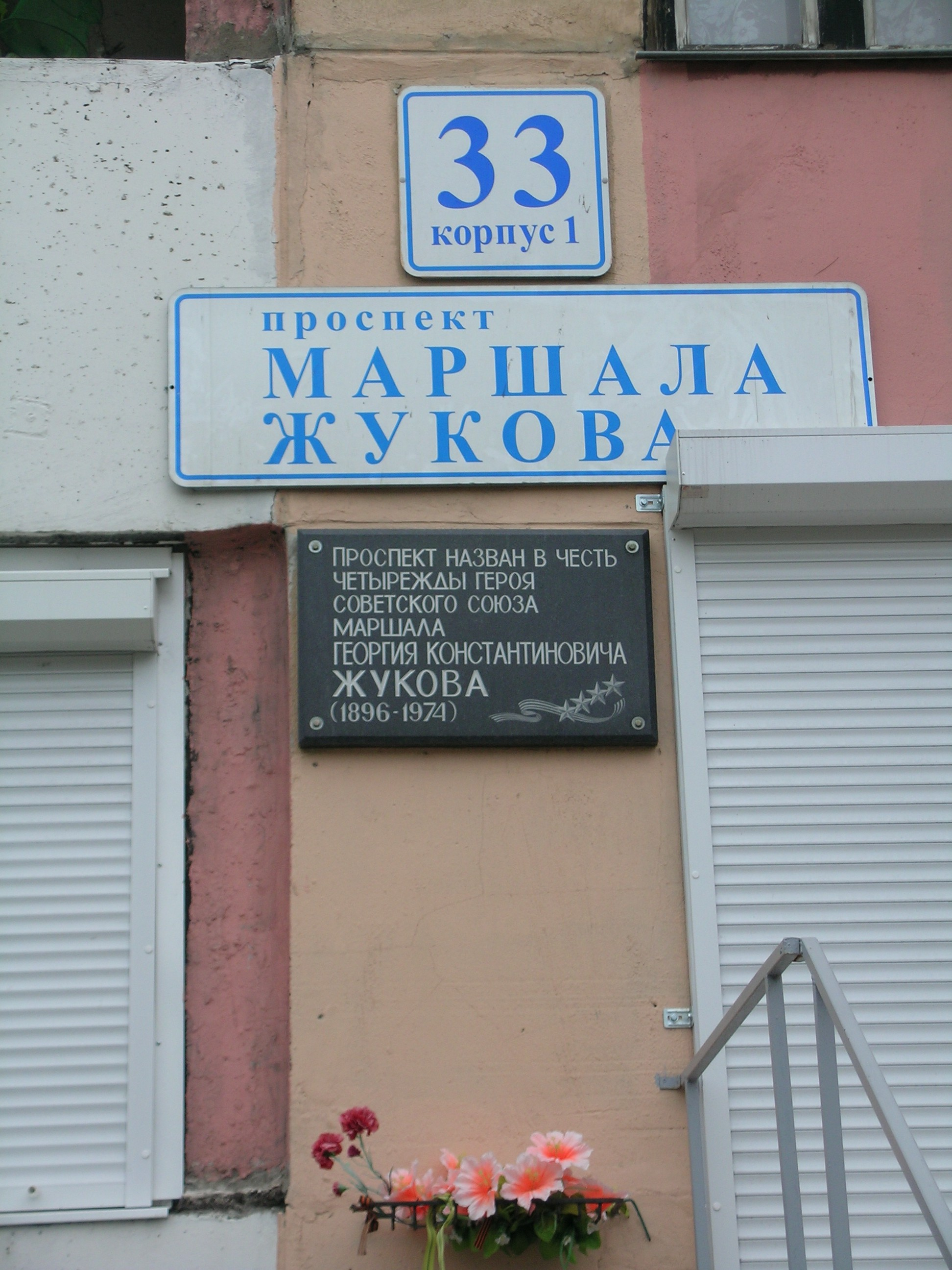 Проспект назван в честь четырежды Героя Советского Союза маршала Георгия Константиновича Жукова. На доме 33 корп. 1.